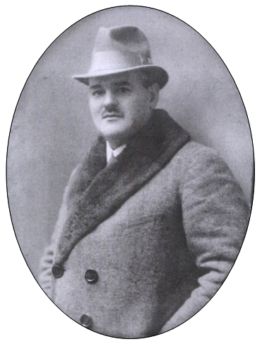 Der Varieté-Direktor Alex Braune aus Berlin